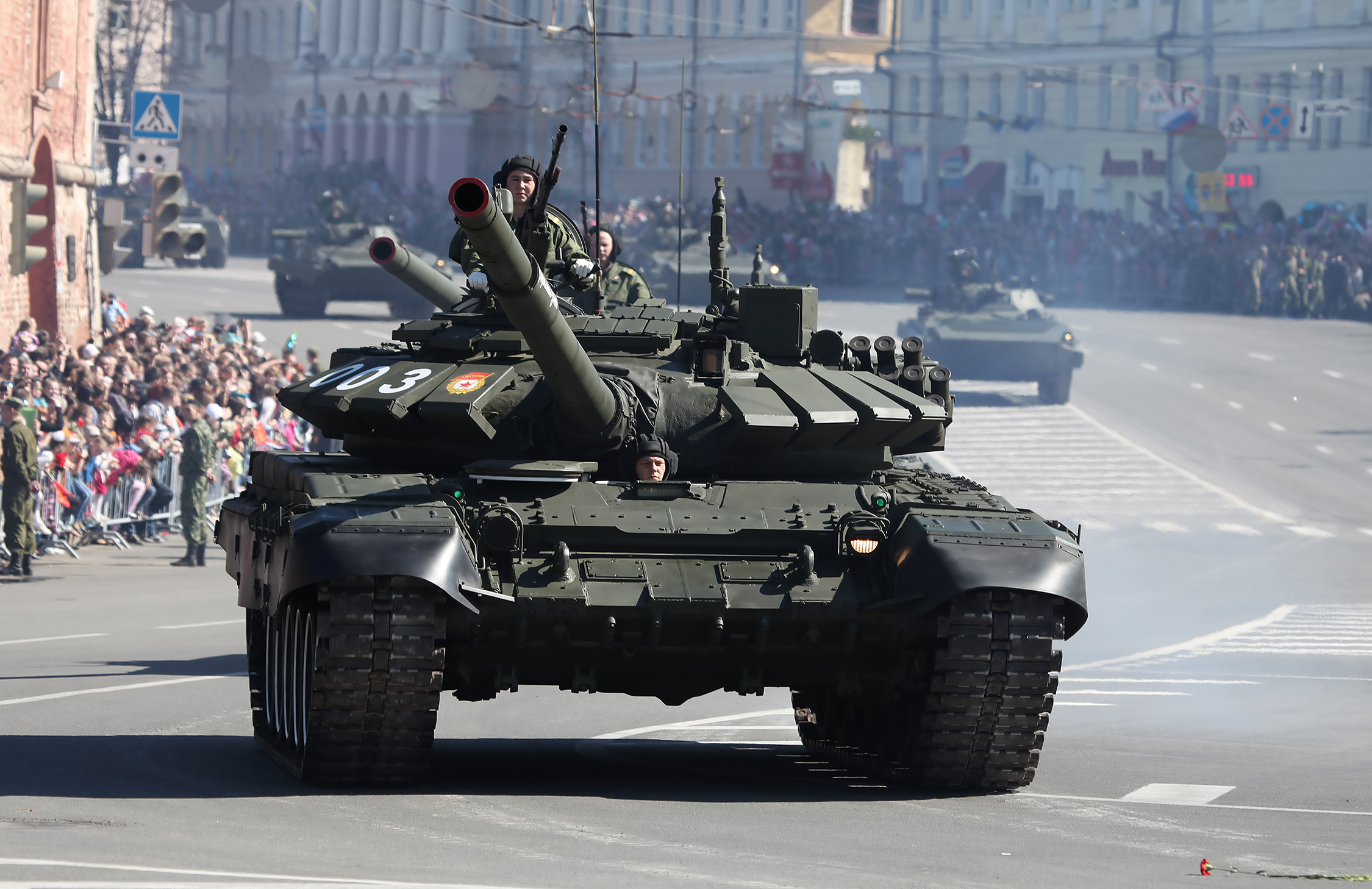 Т-72Б3 на параде Победы в Нижнем Новгороде 9 мая 2014 года.